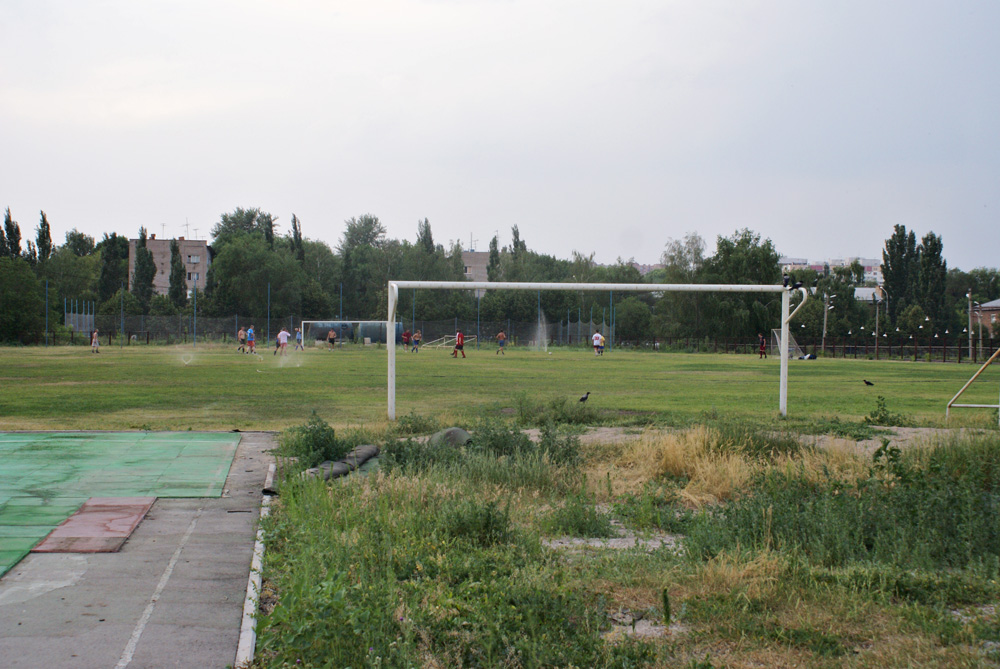 Самара, стадион «Орбита», ул. Ставропольская, 16